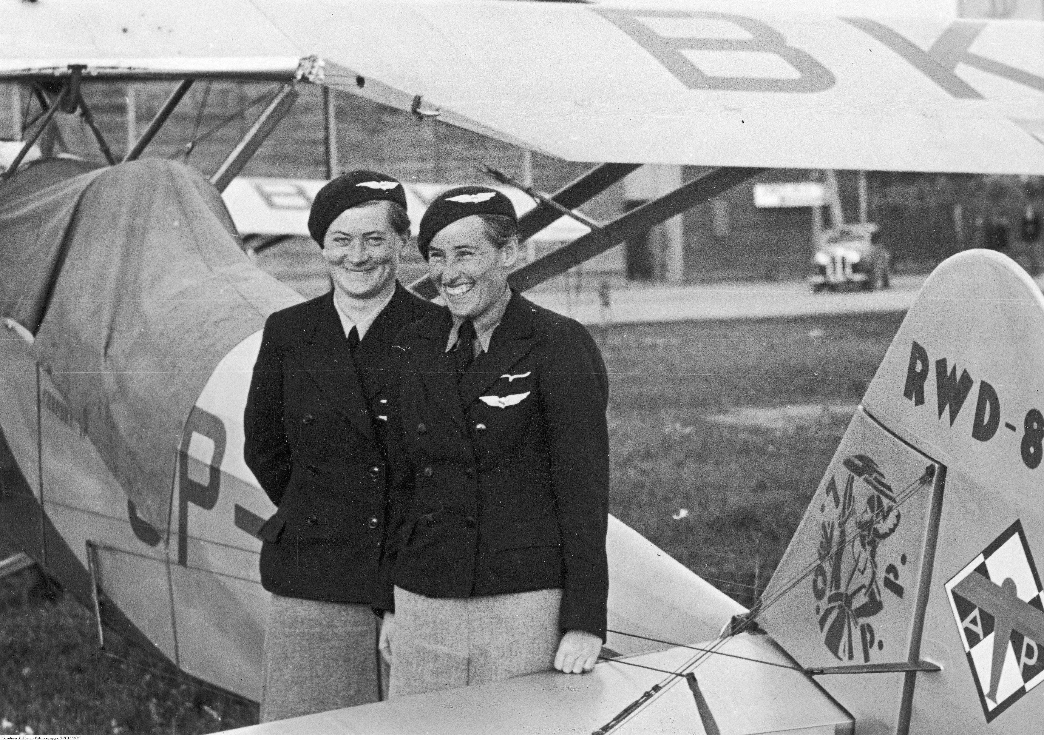 Krajowe zawody lotnicze na Lotnisku Mokotowskim w Warszawie; sierpień 1938. Pilot Wanda Modlibowska (z prawej) i pilot Ewa Korczyńska przy samolocie RWD-8 ufundowanym przez Ligę Obrony Powietrznej i Przeciwgazowej. Koncern Ilustrowany Kurier Codzienny - Archiwum Ilustracji. Sygnatura: 1-S-1300-5